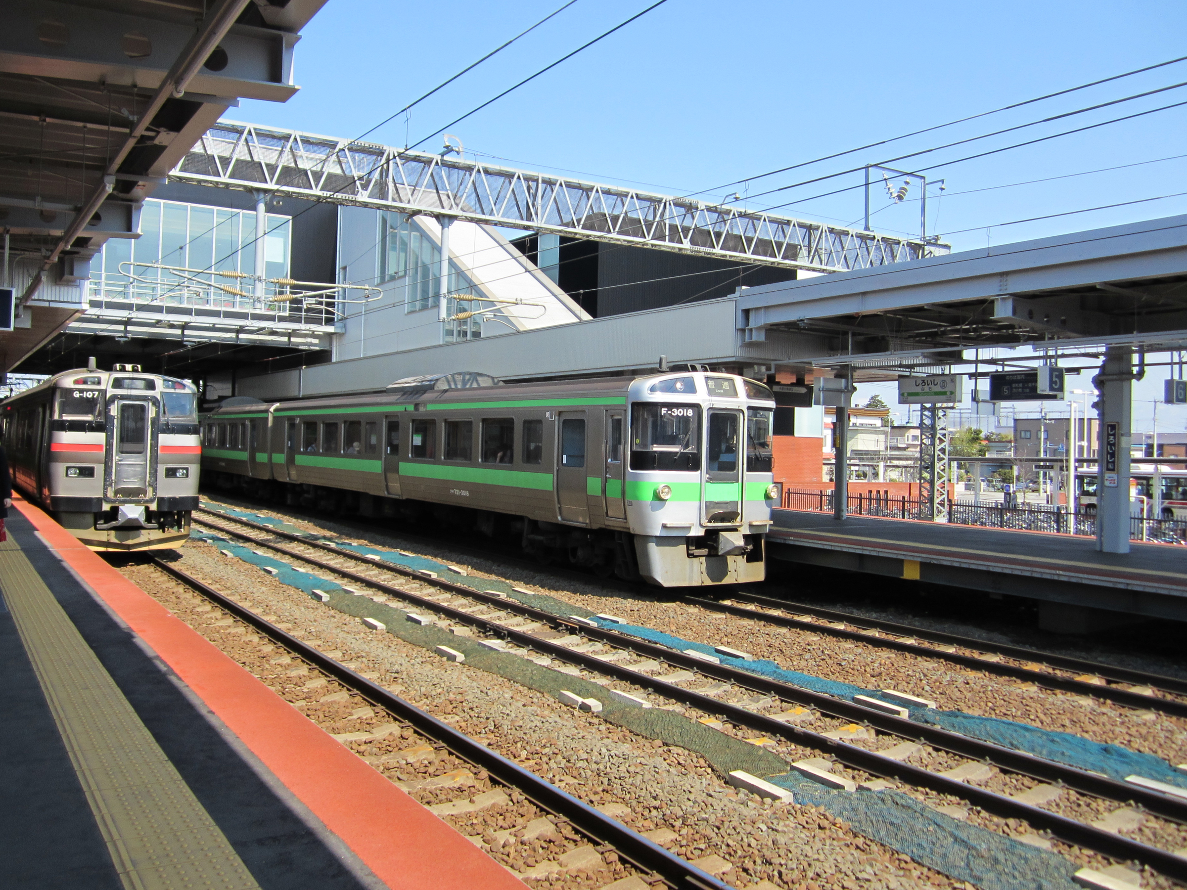 白石駅に停車中の721系電車と731系電車